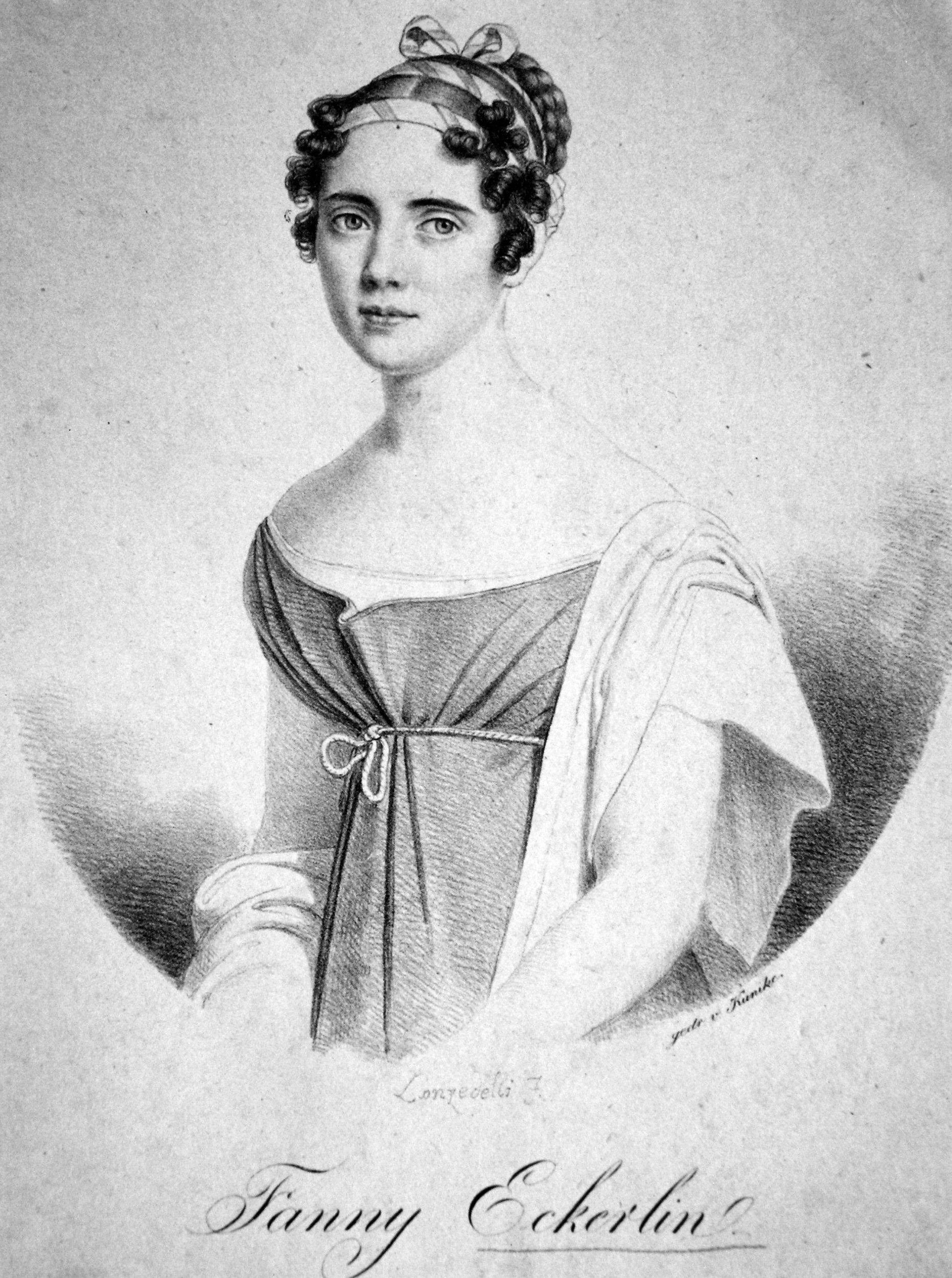 Fanny Eckerlin (1802-1842), österreichische Opernsängerin. Lithographie von Josef Lanzedelly d. Ä., um 1820